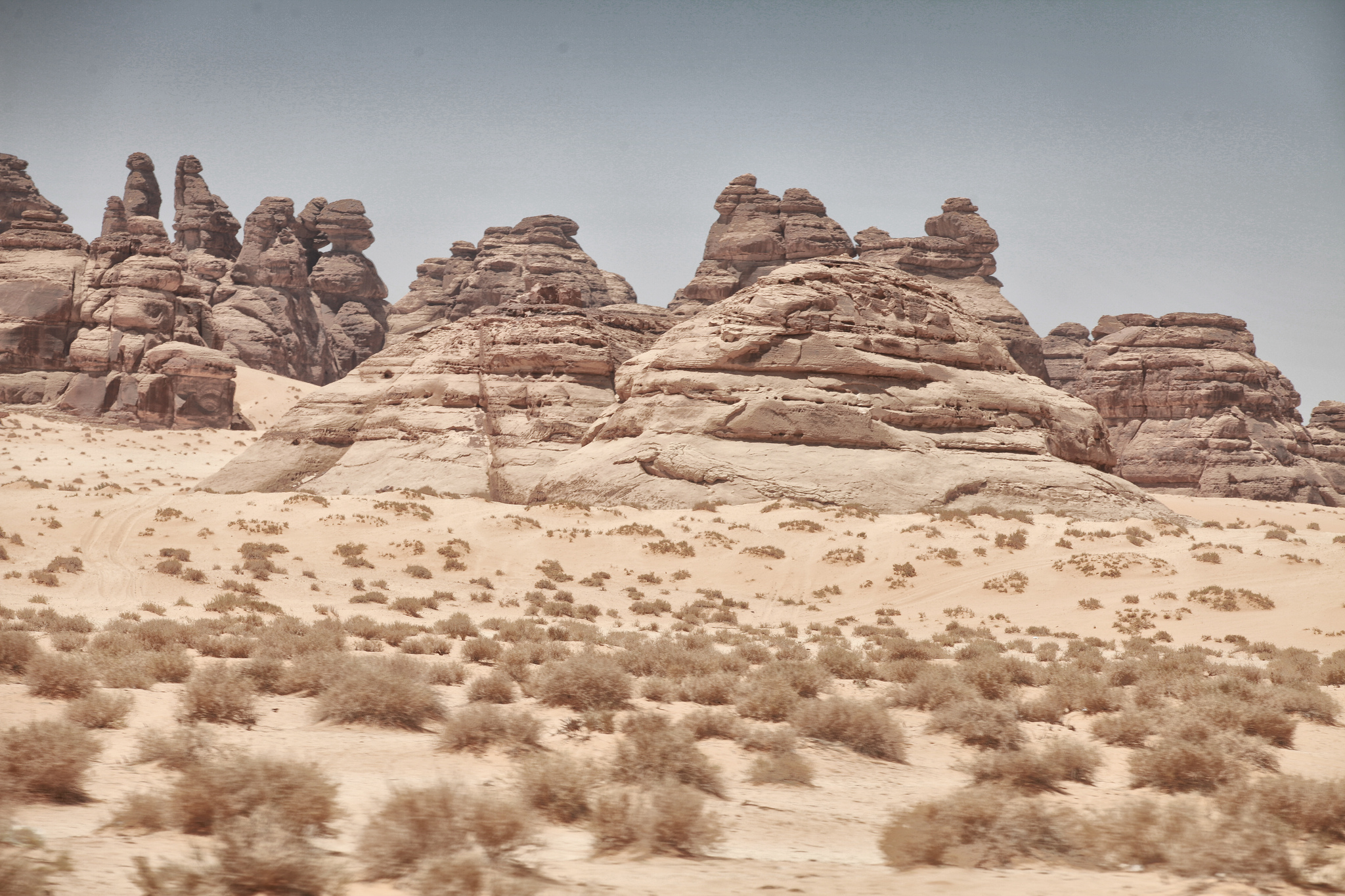 آثار تعود لمملكة لحيان التي يرجع تاريخها إلى ما قبل الميلاد، تقع على إحداثيات: 26°48′51″N 37°56′51″E ، العلا - السعودية.